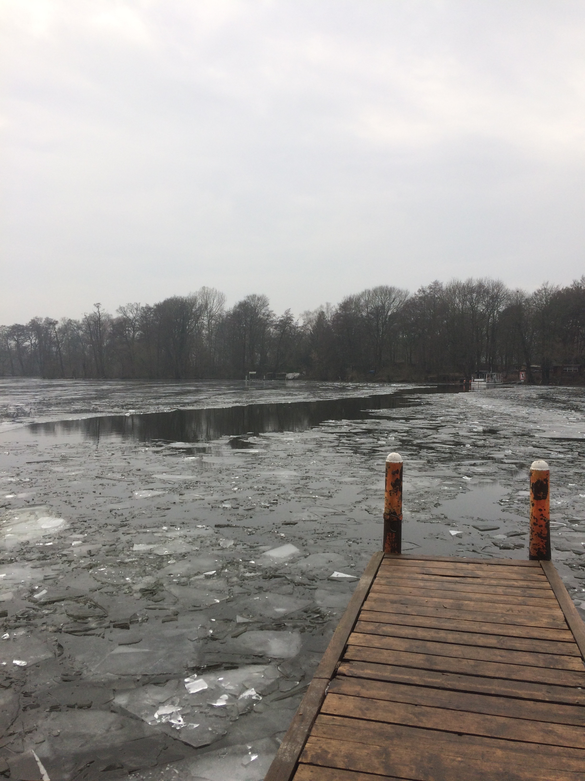 Steganlage der Fähre des VNBR e.V. an der Landseite im Winter 2016